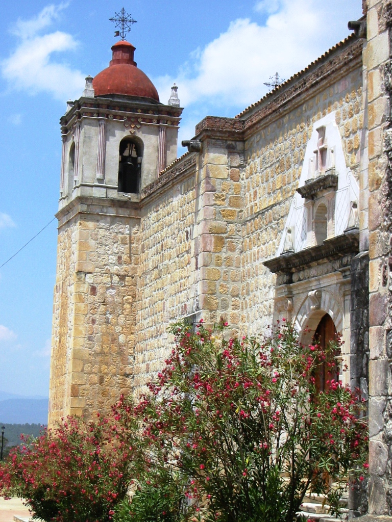 Templo de San Mateo en Capulálpam de Méndez edificada en el siglo XVI